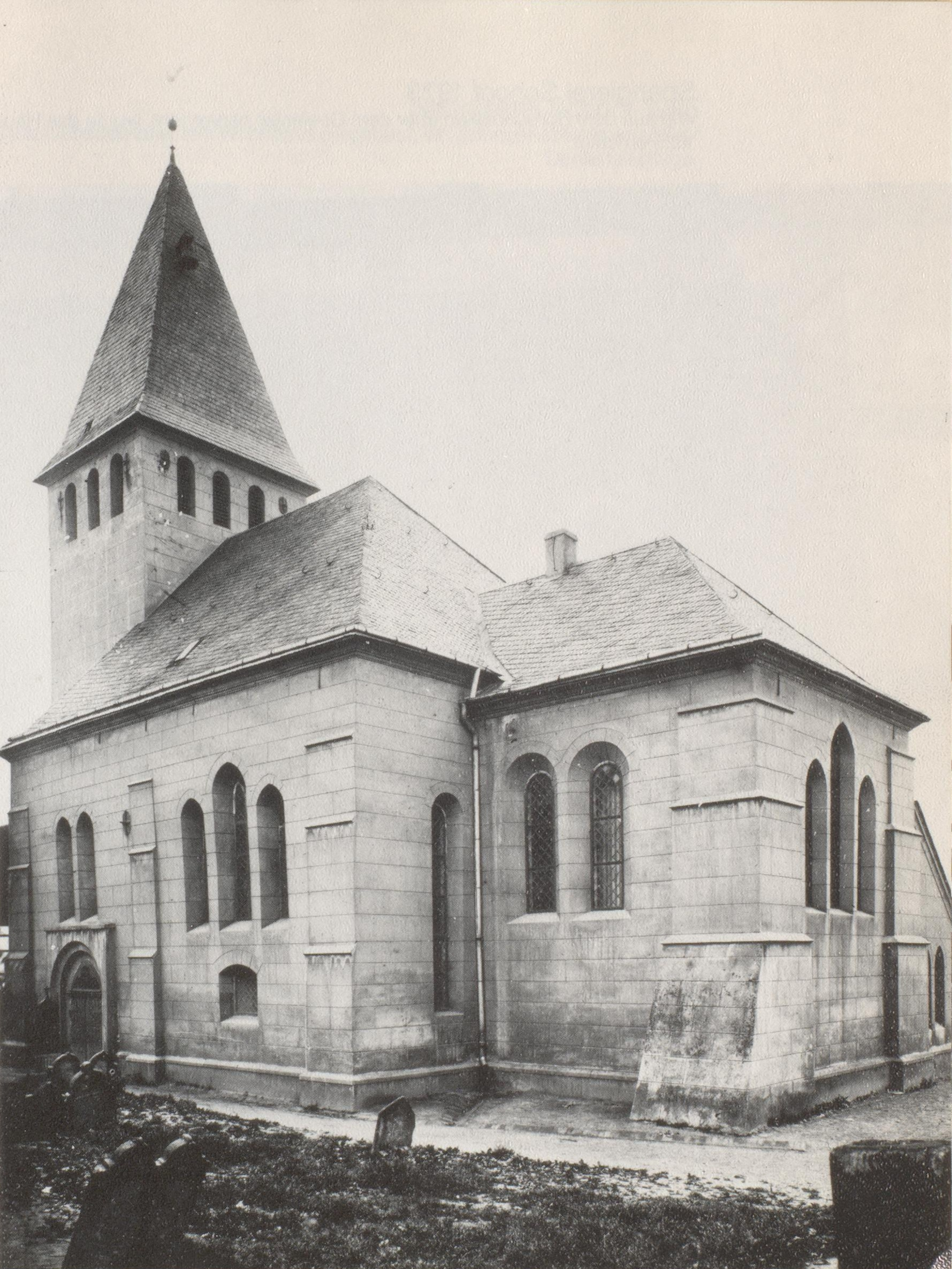 Die Johanneskirche in Wickede um 1890 von der Süd-Ostseite.